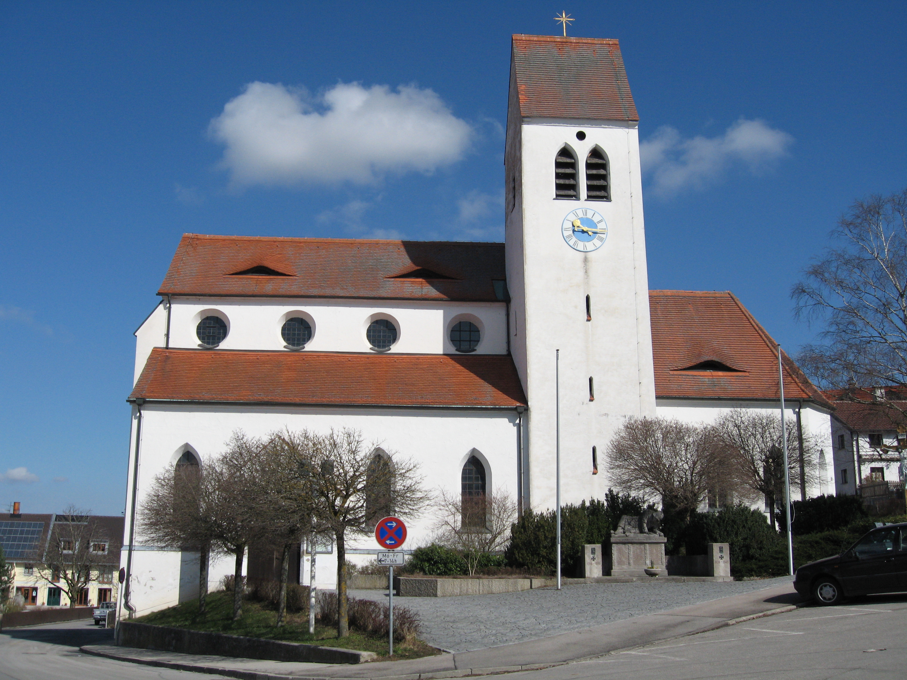 St. Vitus